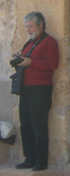 El fotògraf mallorquí Toni Catany